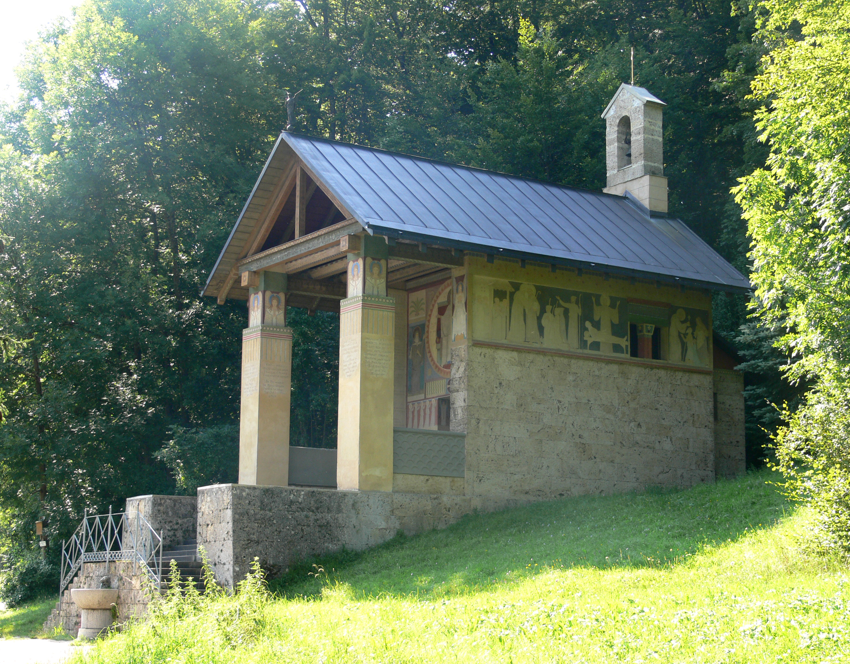 St.-Maurus-Kapelle, Beuron (Donautal), erbaut 1868–1870, Architekt: Desiderius Lenz, Maler: Gabriel Wüger